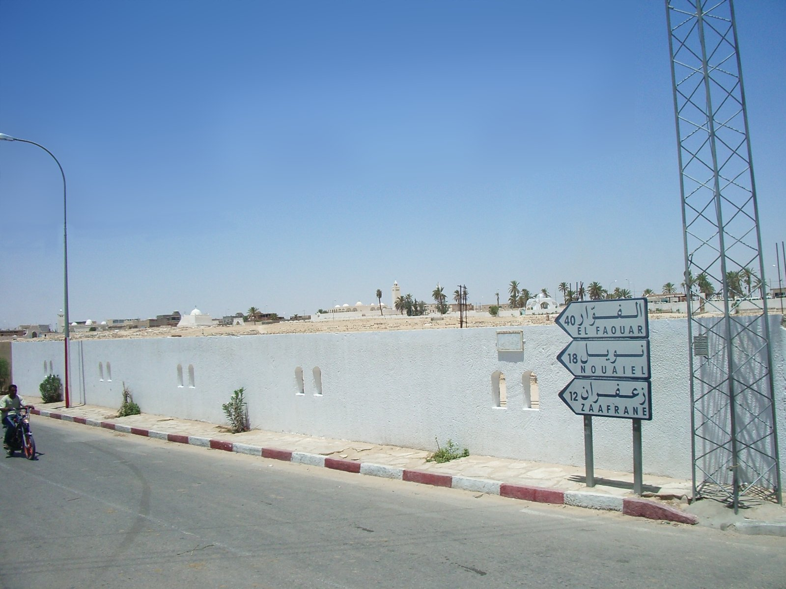 Douz